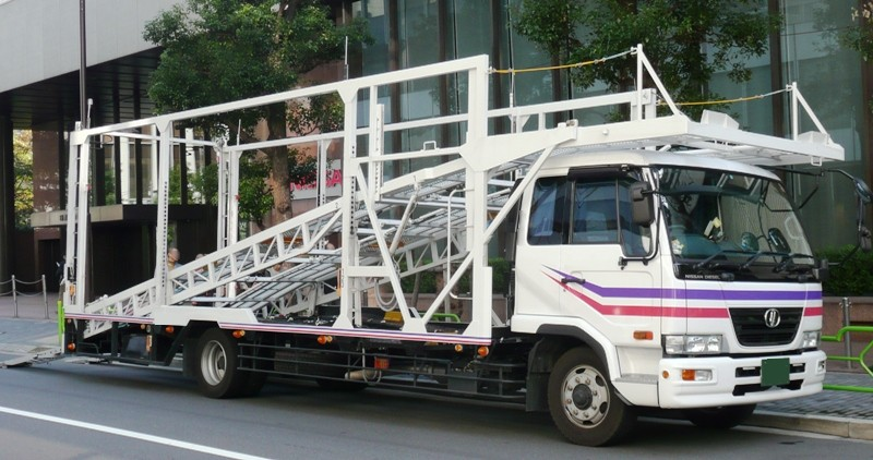 Carrier car.